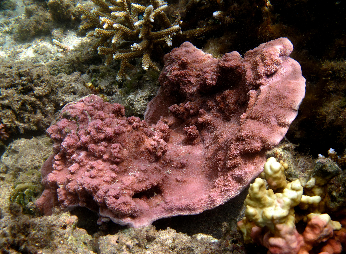 Une colonie de corail Montipora tuberculosa à la Réunion.